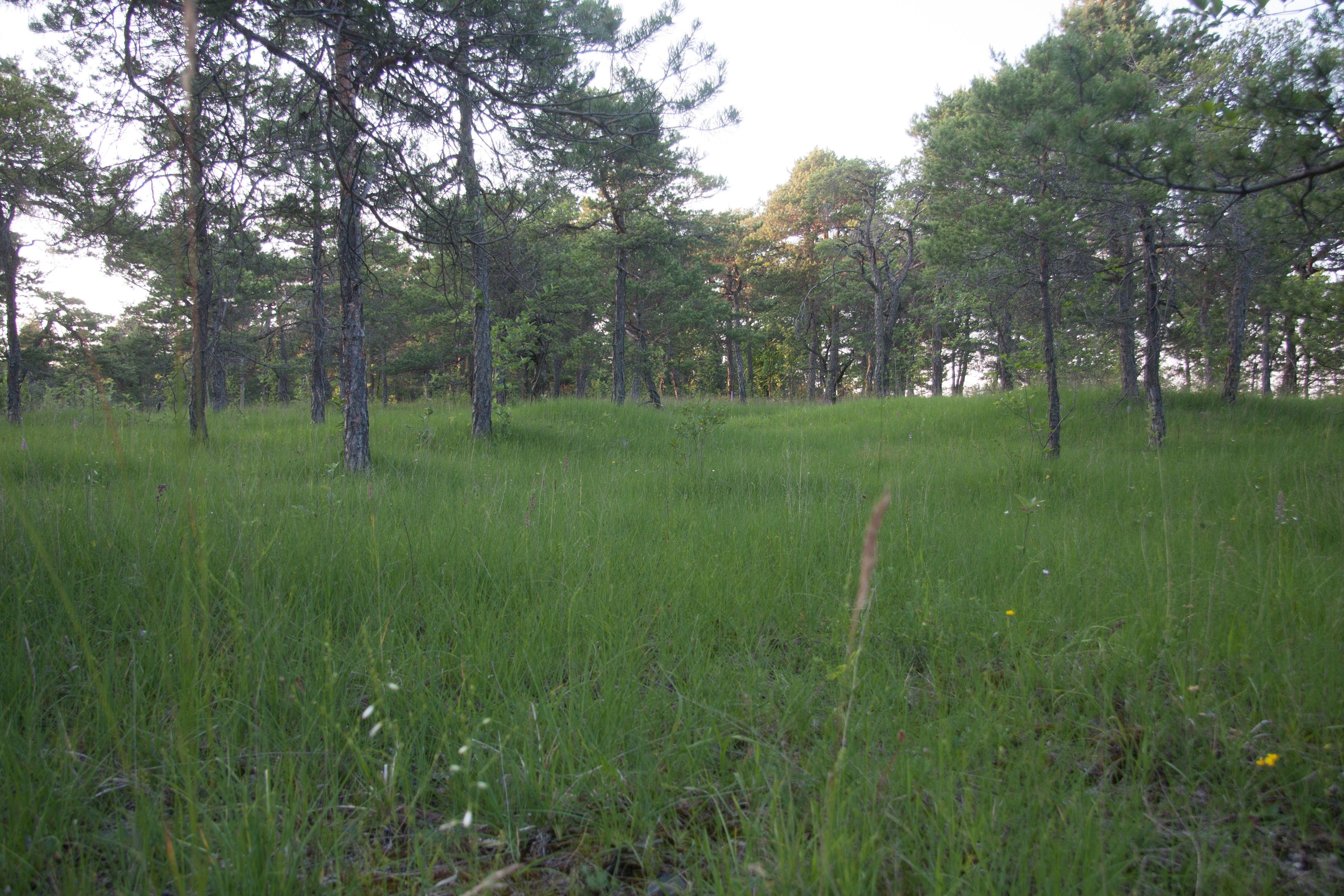 Naturschutzgebiet „Höhfeldplatte und Scharlachberg“: Höhfeldplatte, Unterfranken, Bayern